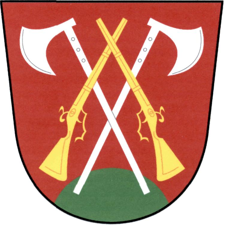 Znak obce Stráž (okres Domažlice)